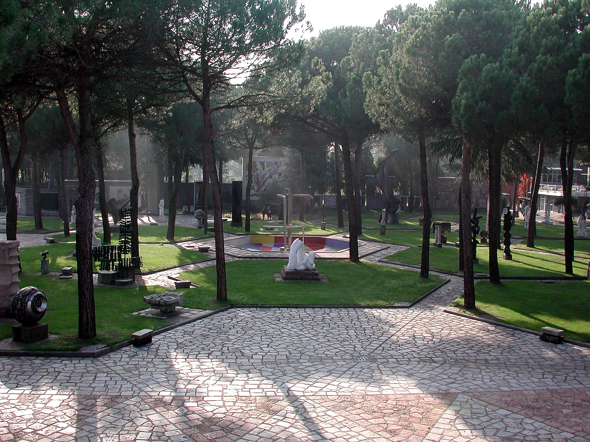 panoramica parco Museo Pagani